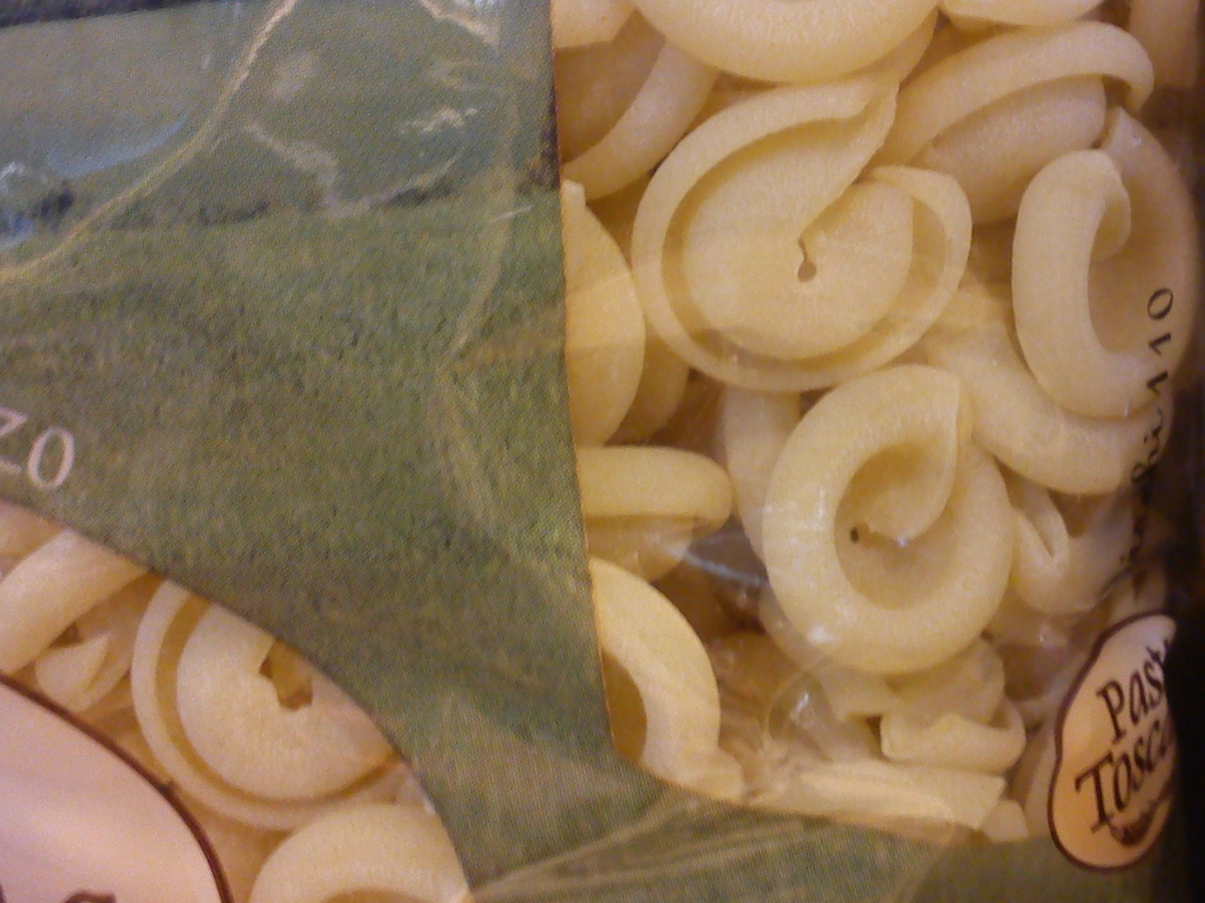 Pasta, dischi.